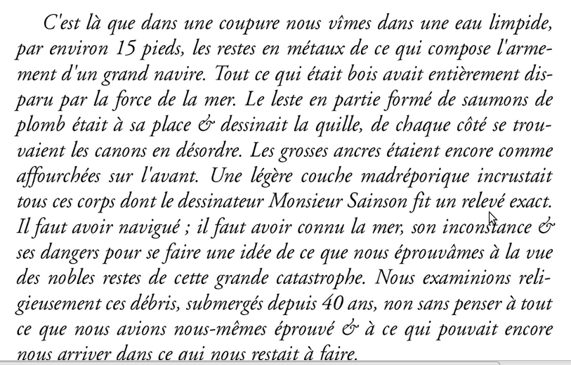 Étienne Beaumont, Vanikoro: Journal d’un médecin légiste sur «l’île du Malheur» où périt Lapérouse, communication à la société de Rochefort, le 20 juin 1832.